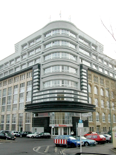 Bild: stoha. Das Verlagshaus Rudolf Mosse in der Jerusalemer Straße, Ecke Schützenstraße. Die originalen Fassadenteile stammen vom ersten Mosse-Geschäftshaus, nach Plänen des Architekten Eduard Titz 1874 errichtet. 'Eckeinpfropfung' von Erich Mendelsohn. Rekonstruktion 1995.